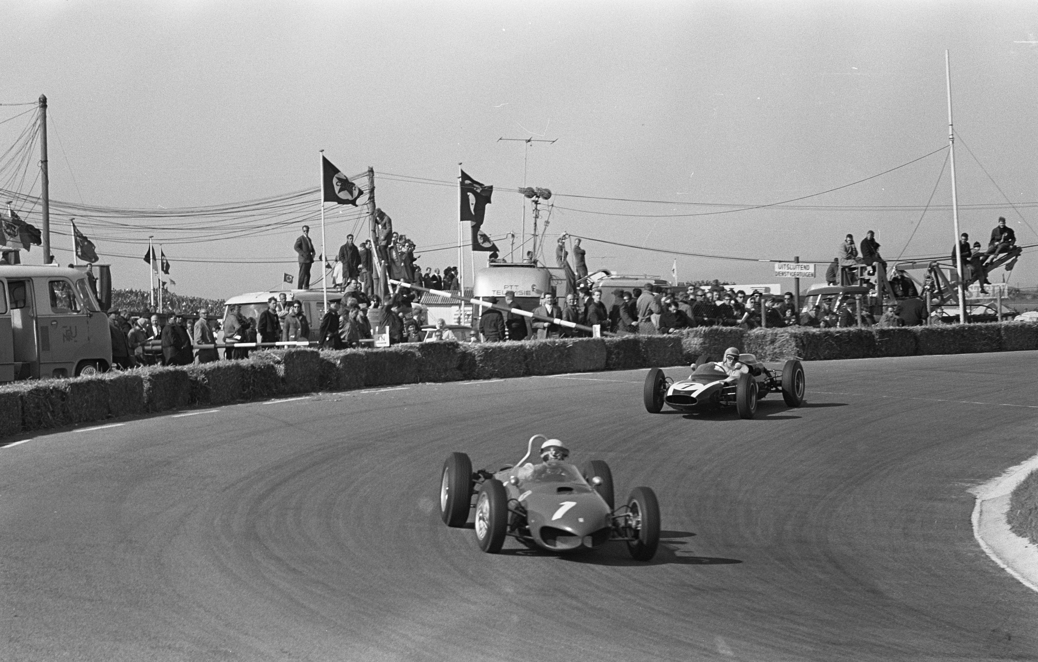 Grand Prix circuit te Zandvoort.